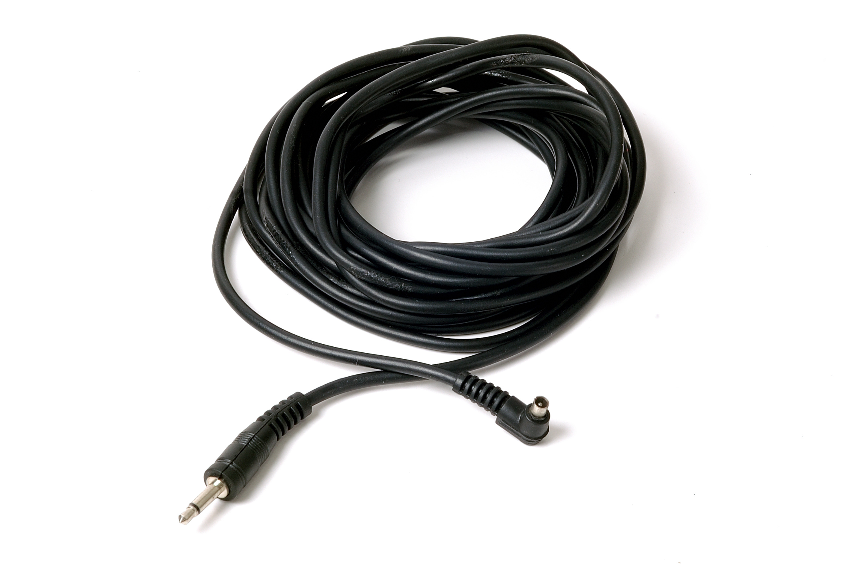 Blitzsynchronkabel